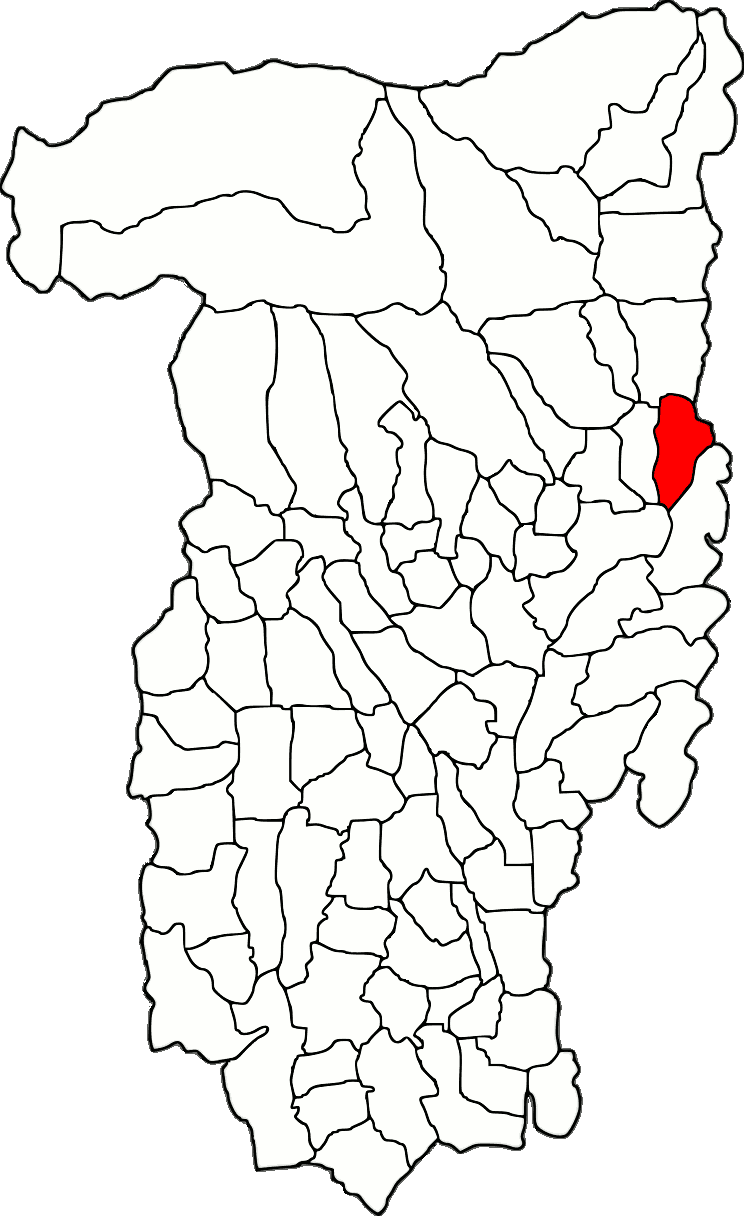 Lage der Gemeinde Runcu im Kreis Vâlcea (RO).